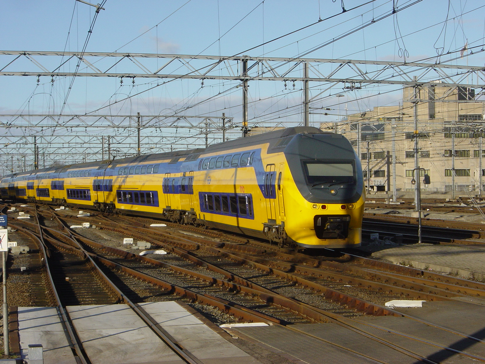 Dubbeldeks Interregiomaterieel (verlengd tot zes bakken) te Utrecht CS. Eigen foto, december 2005